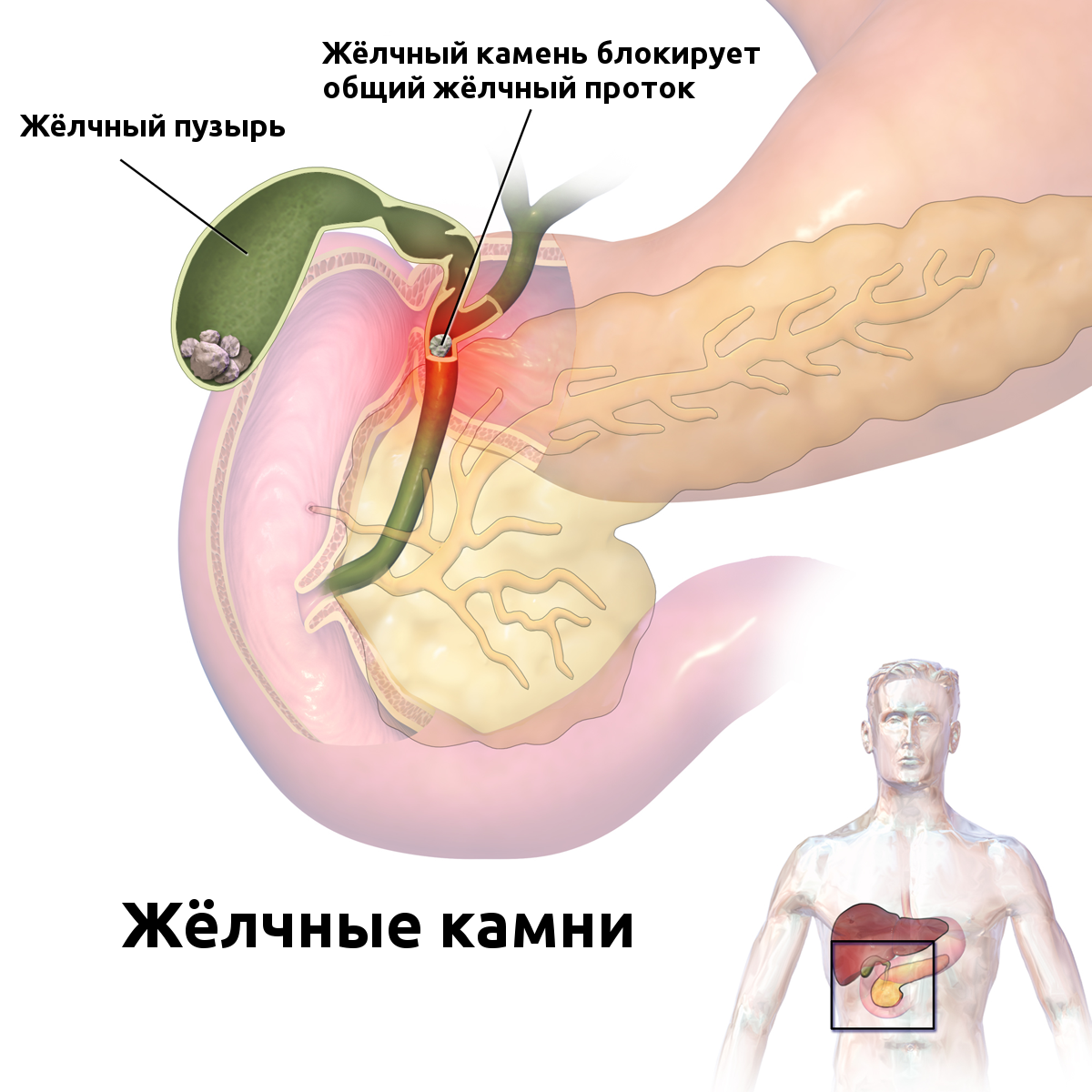 Желчные камни